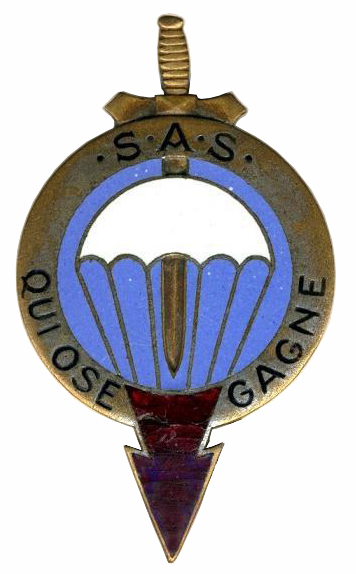 Insigne du 1er bataillon coloniaux de chasseurs parachutistes SAS identique à celui du 2e RCP repris par la suite par le 1er RPIMA